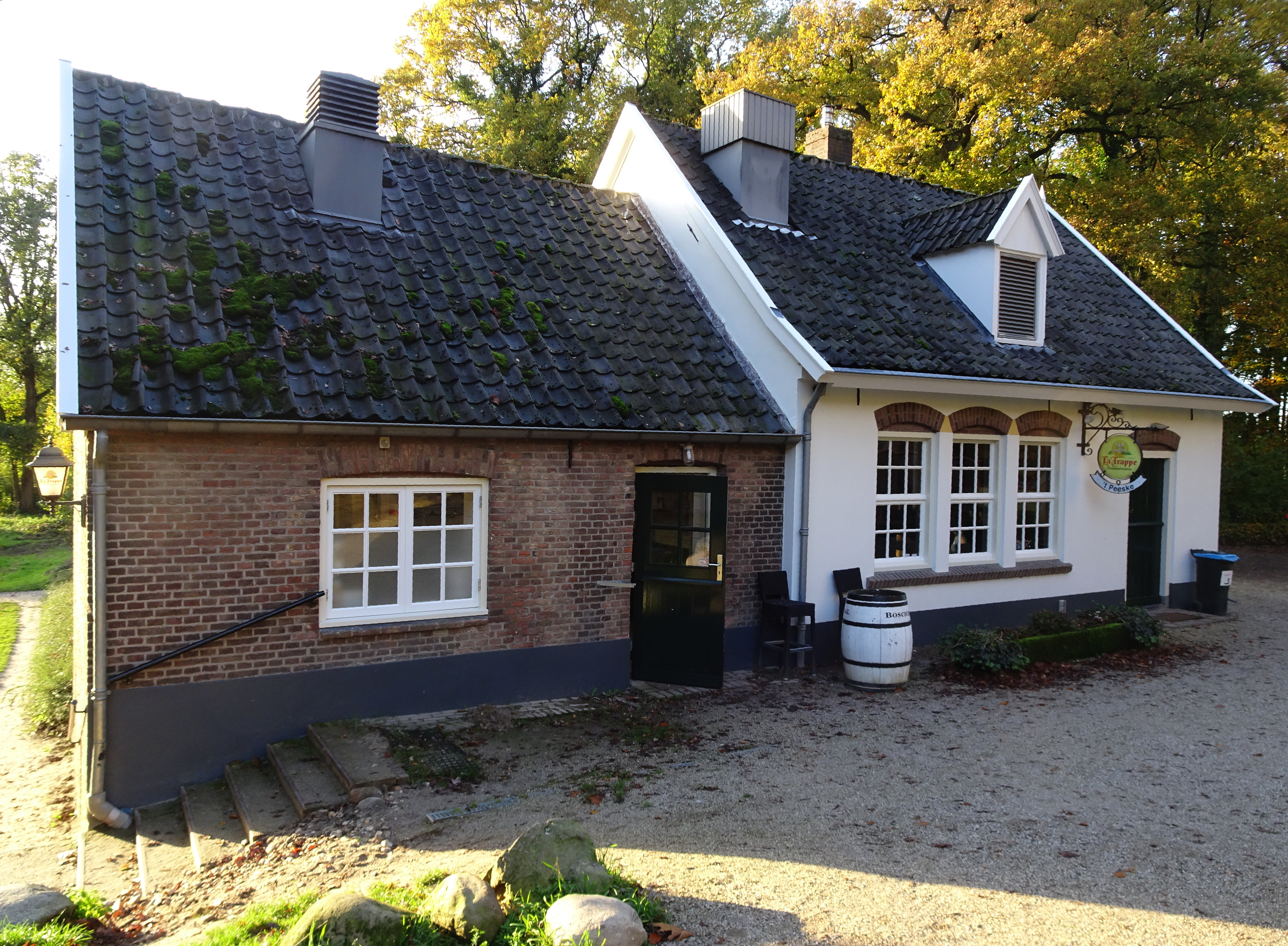 Beek Montferland, 't Peeske